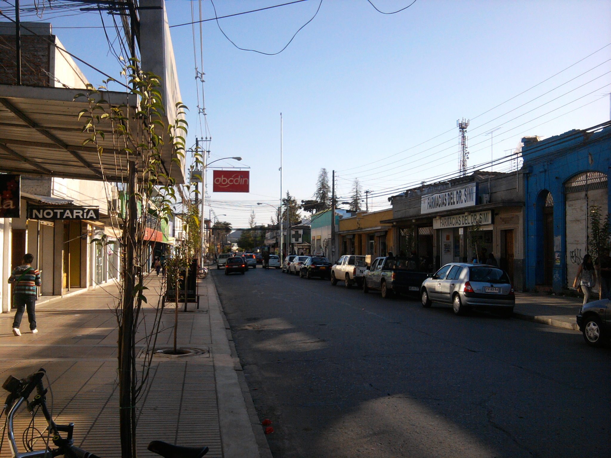 Calle Arturo Prat, Rengo